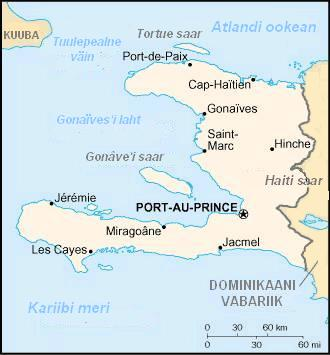 Haiti kaart